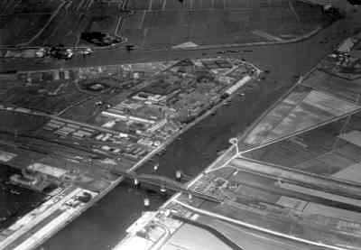 Luchtfoto van het Noordzeekanaal met de Hembrug, de grootste draaibrug van Europa. Links boven de brug de Artillerie-inrichtingen.